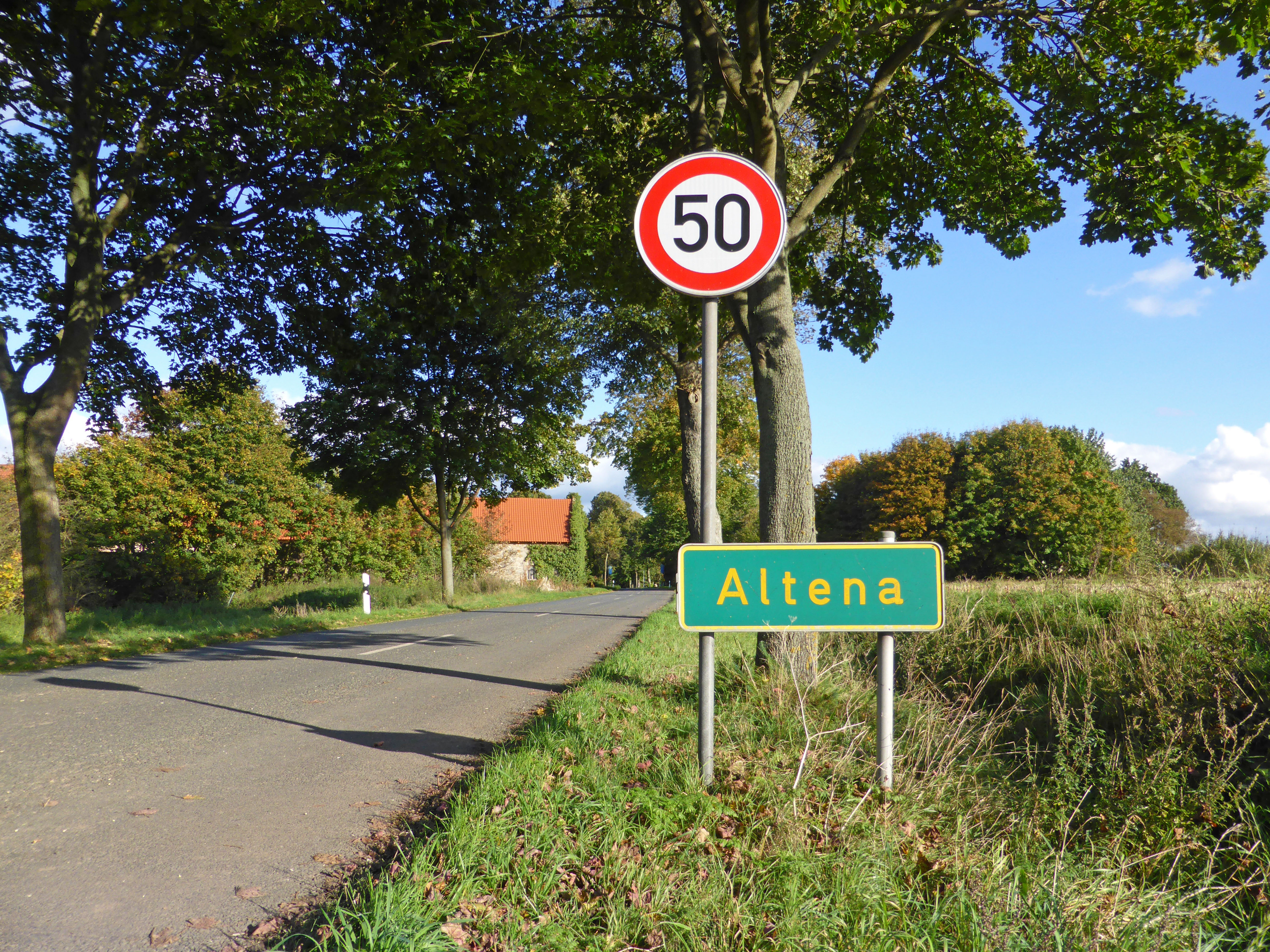 Nördlicher Ortseingang von Altena bei Saalsdorf.